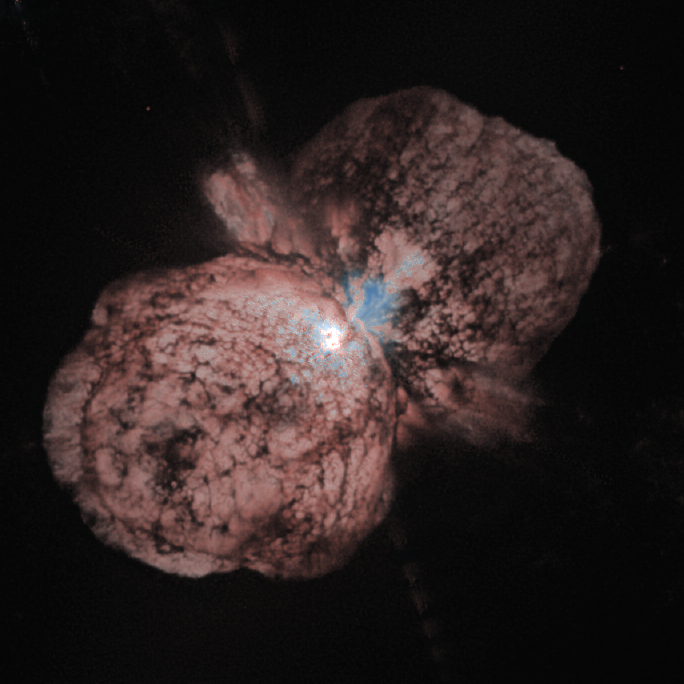 Aufnahme des Hubble-Weltraumteleskops des Sterns η Carinae (September 1995). Image Credit: NASA, STScI